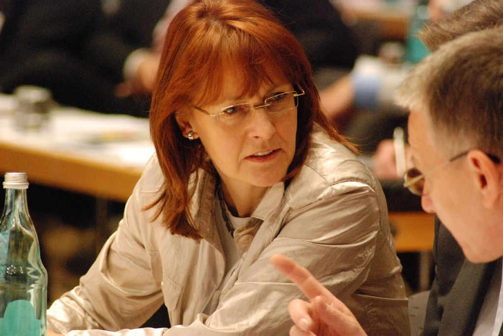 Edelgard Bulmahn im Gespräch mit Dirk-Ulrich Mende, Landesvertreterversammlung der niedersächsischen SPD zur Bundestagswahl 2009